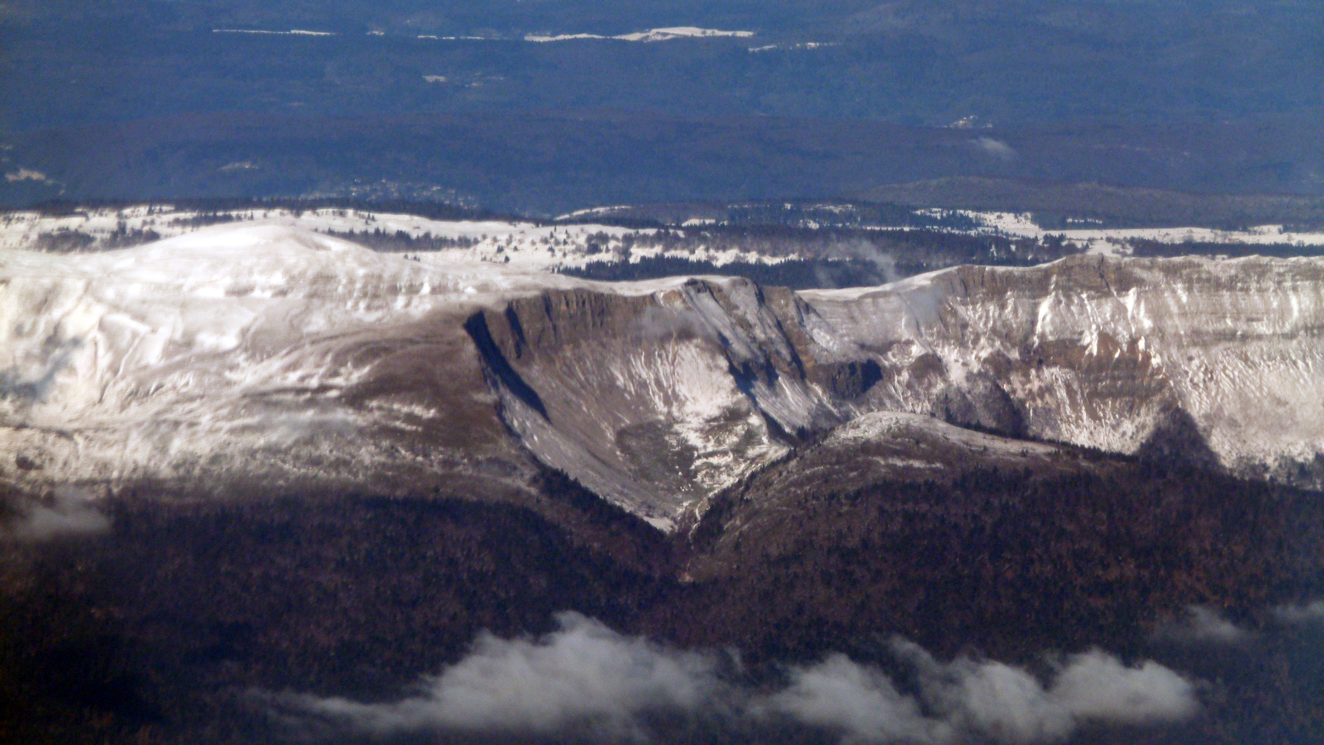 Der Colomby de Gex mit Ausräumungskessel im Jura-Gebirge, vom Flugzeug aus fotografiert